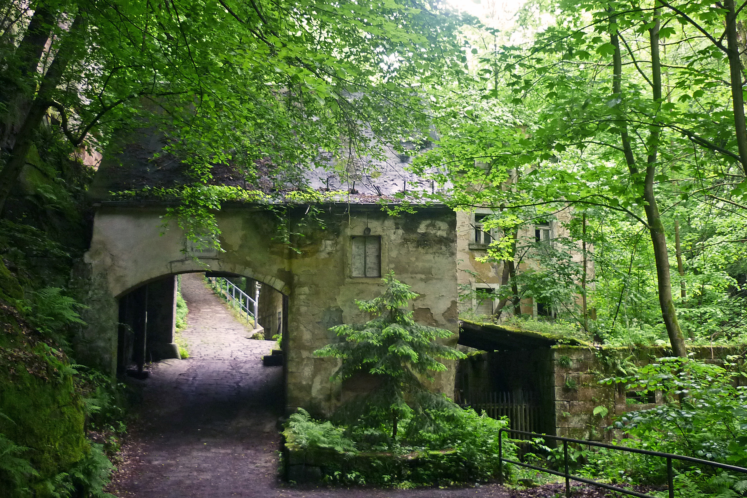 Verfallene Lochmühle im Liebethaler Grund in Mühlsdorf bei Lohmen (Sachsen)